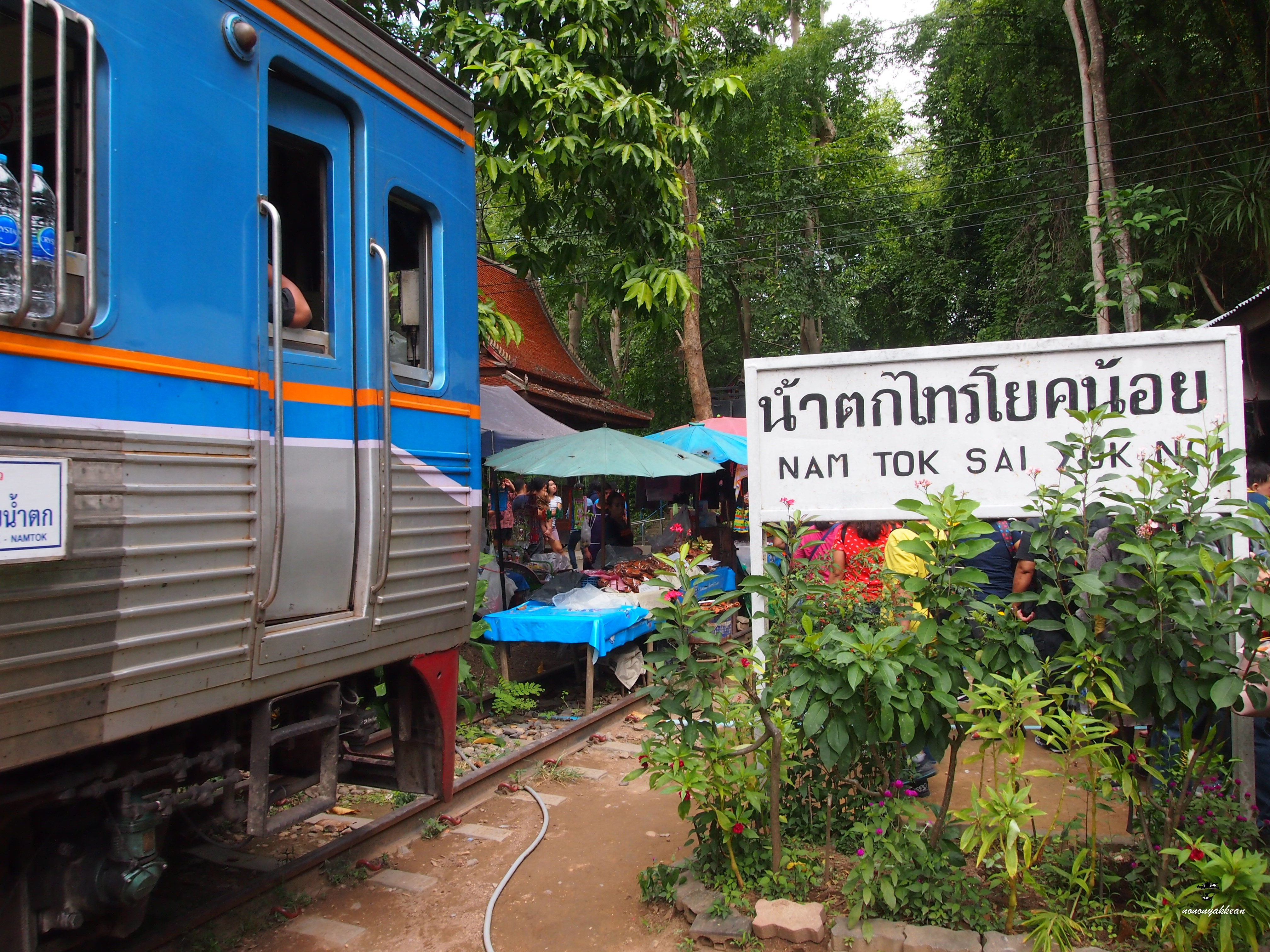 ขบวน 909 /910 จอดเทียบป้ายหยุดรถไฟน้ำตกไทรโยคน้อย